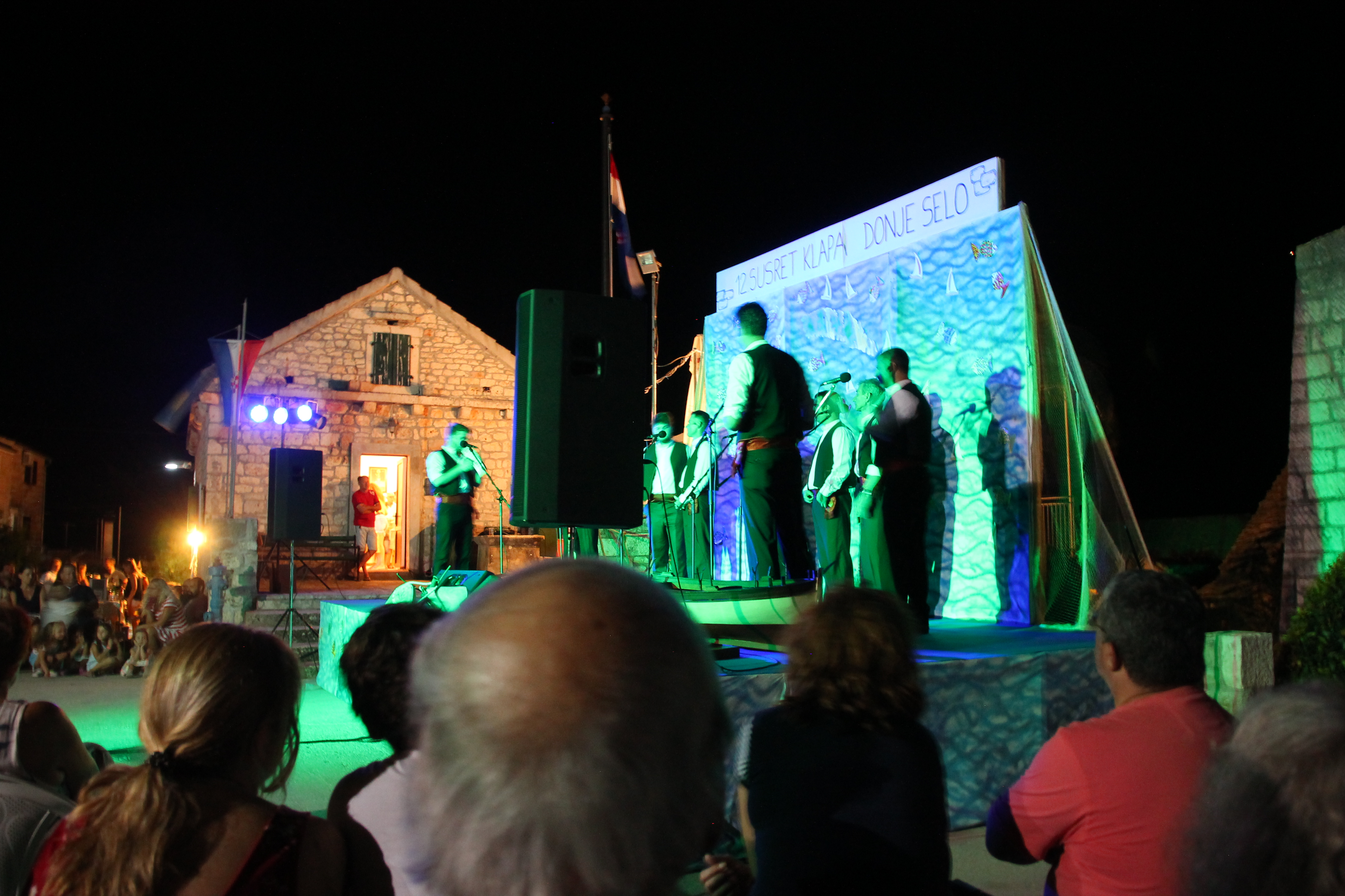 Donje Selo, susret klapa 2018, festival dalmatských písní